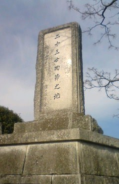 野根山二十三士記念碑 23 Samurai Memorial, Tano, Kochi, Japan